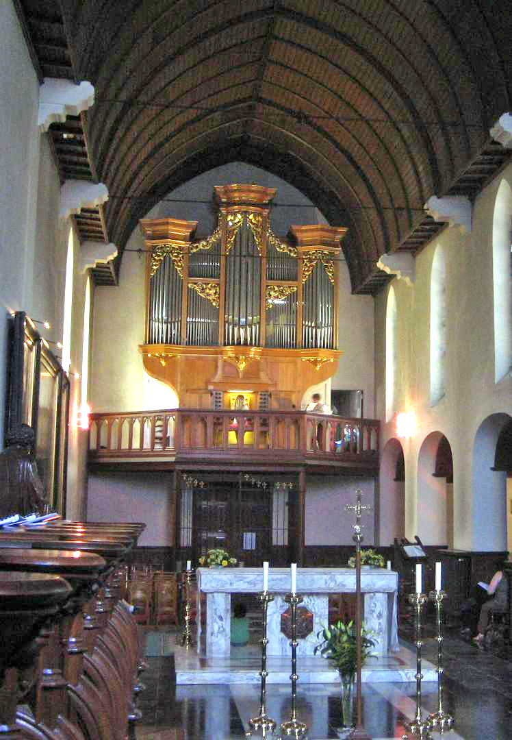 Uergel zu Leffe.